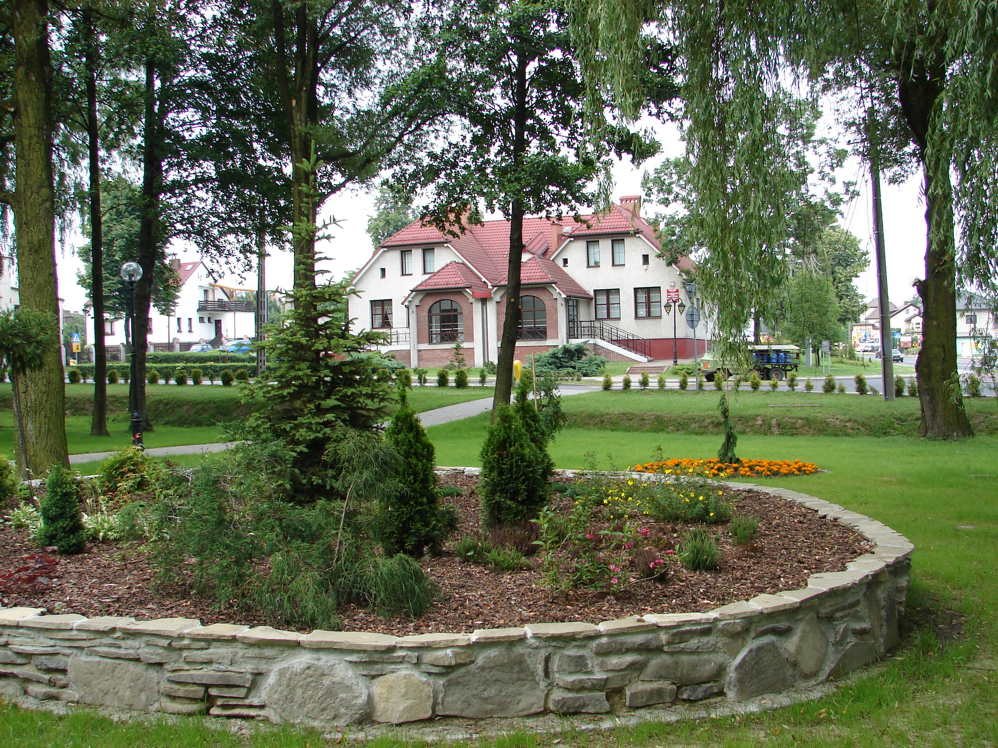 Park i urząd